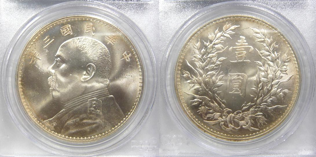 中文（台灣）: 中華民國銀幣